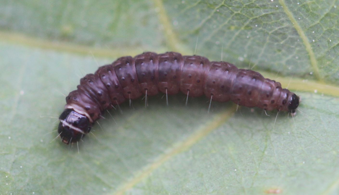 Raupe von Anacampsis timidella in einem Blattwickel; am 10. Mai 2020 in der Schwetzinger Hardt